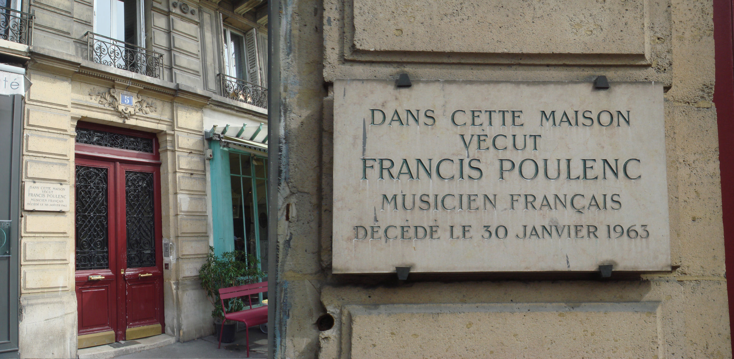 Poulenc Commemorative Plaque, 5 rue de Medicis, Paris